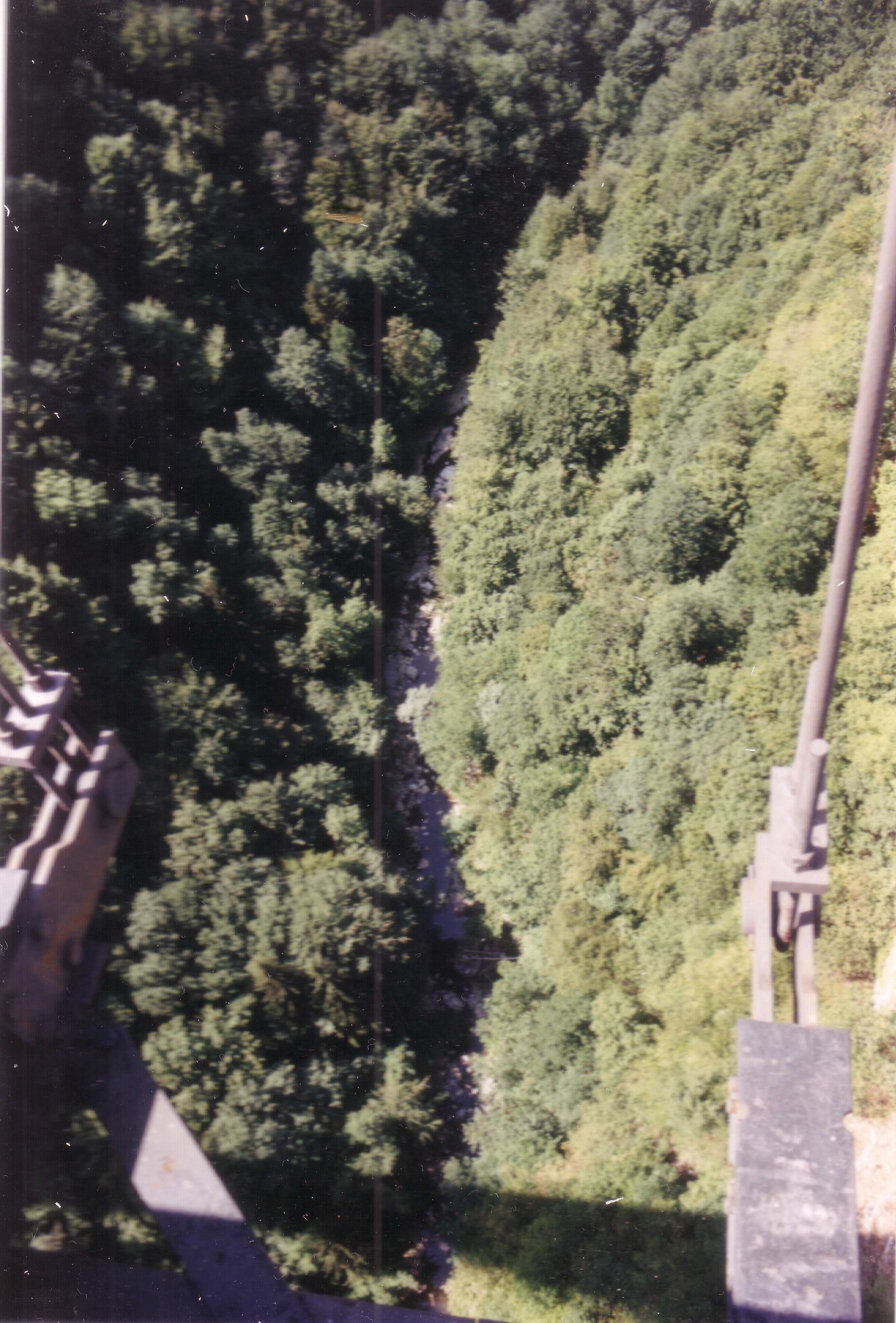 La vallée de la rivière Les Usses vu du Pont de la Caille, Haute-Savoie, France.